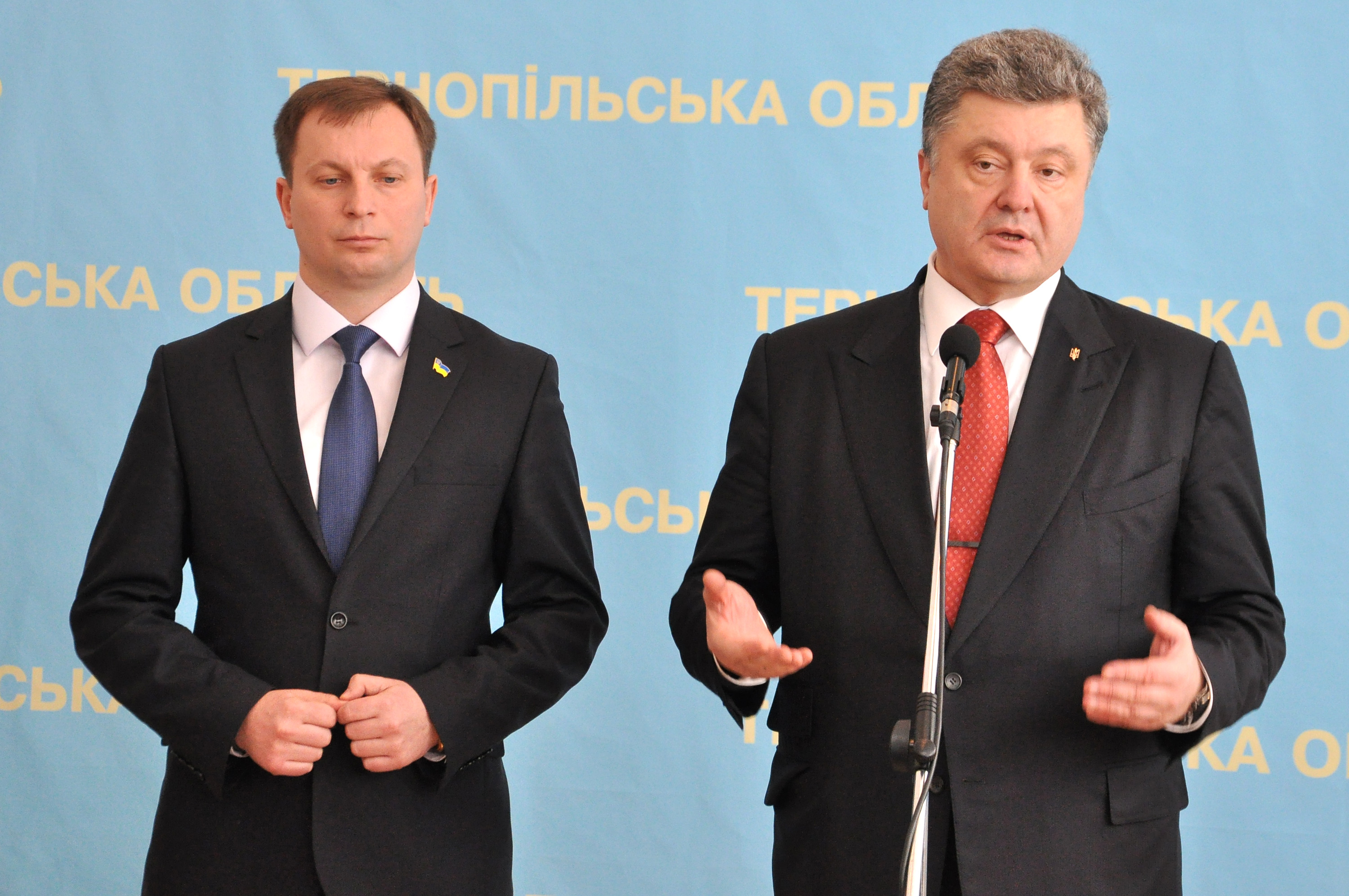 Український громадсько-політичний діяч, голова Тернопільської обласної державної адміністрації Степан Барна і Президент України Петро Порошенко під час візиту до Тернополя 2 квітня 2015 року.